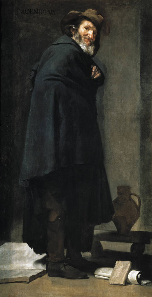 La obra representa al filósofo y escritor griego Menipo de Gadara, y fue ejecutada por el pintor sevillano Diego Velázquez hacia 1638.